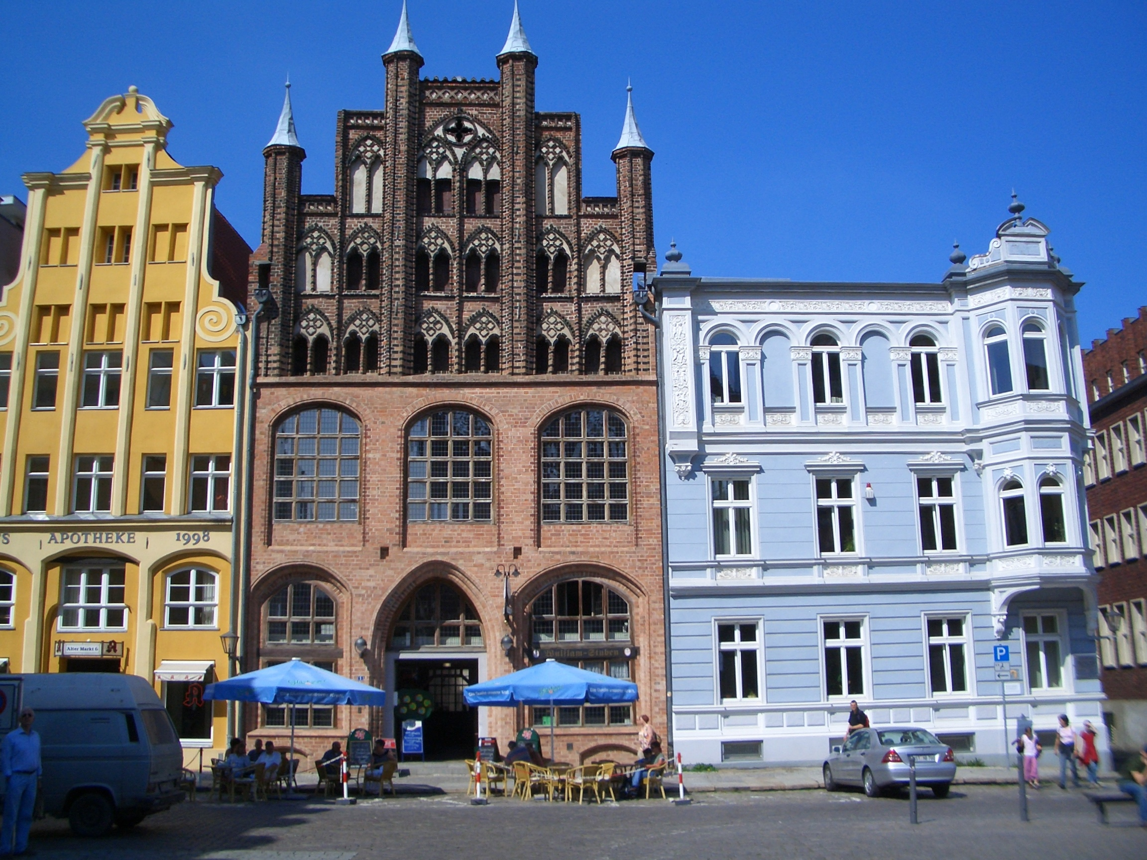 Stralsund, Alter Markt (Nordseite, backsteingotisches Wulflamhaus in der Mitte)